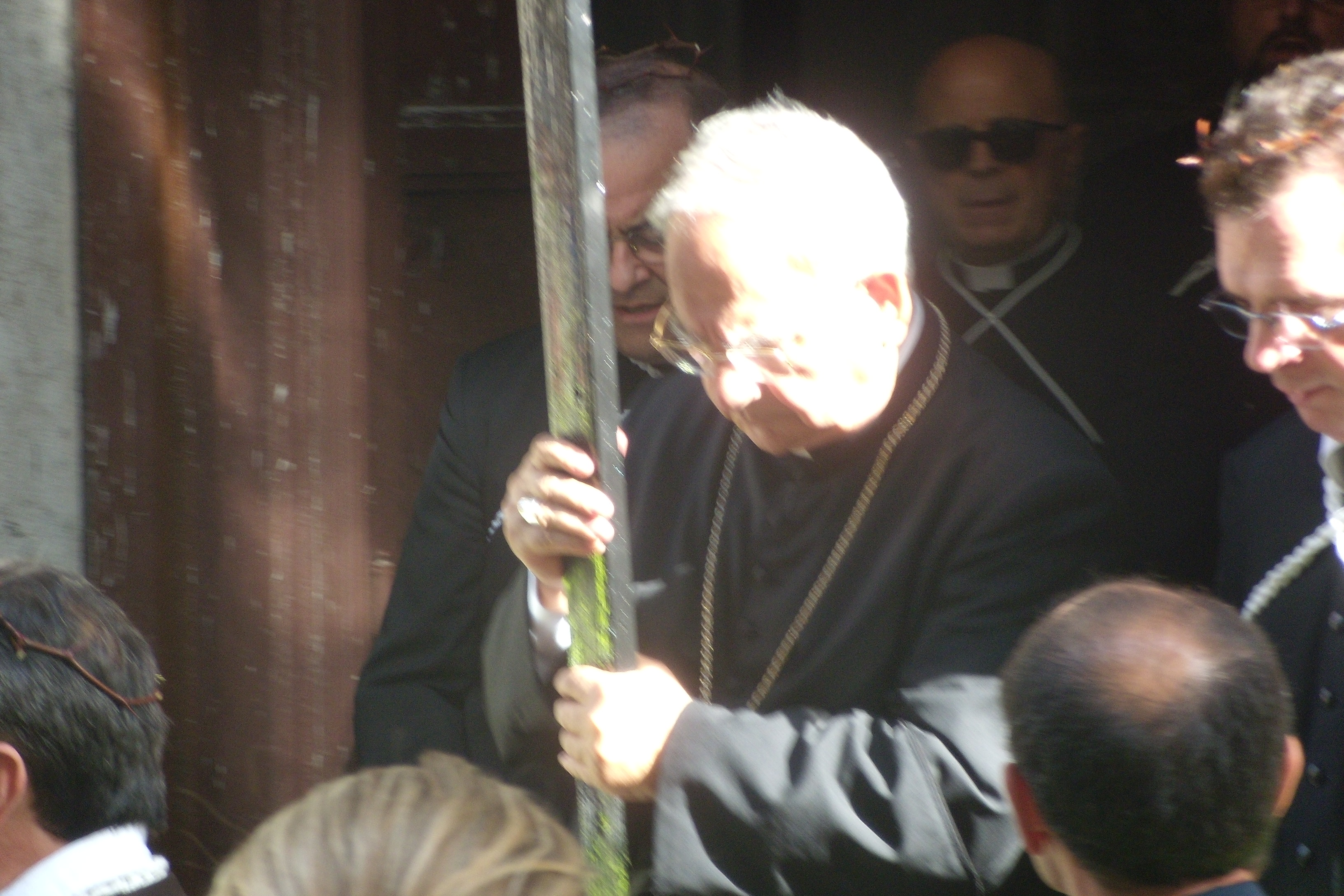 Mons. Michele De Rosa, vescovo della Diocesi di Cerreto - Telese - Sant'Agata de' Goti e Segretario regionale CEI, fotografato durante i Riti settennali di penitenza in onore dell'Assunta dell'agosto 2010.